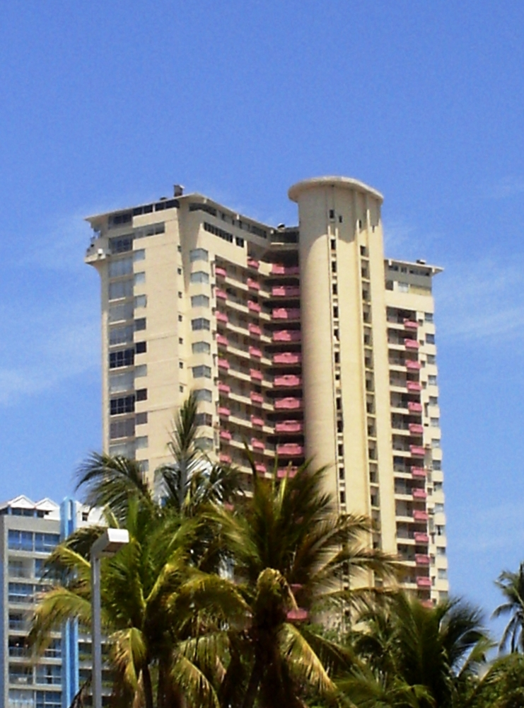 Torre de condominios Torre Coral, el segundo más alto rascacielos en Acapulco, Guerrero, México